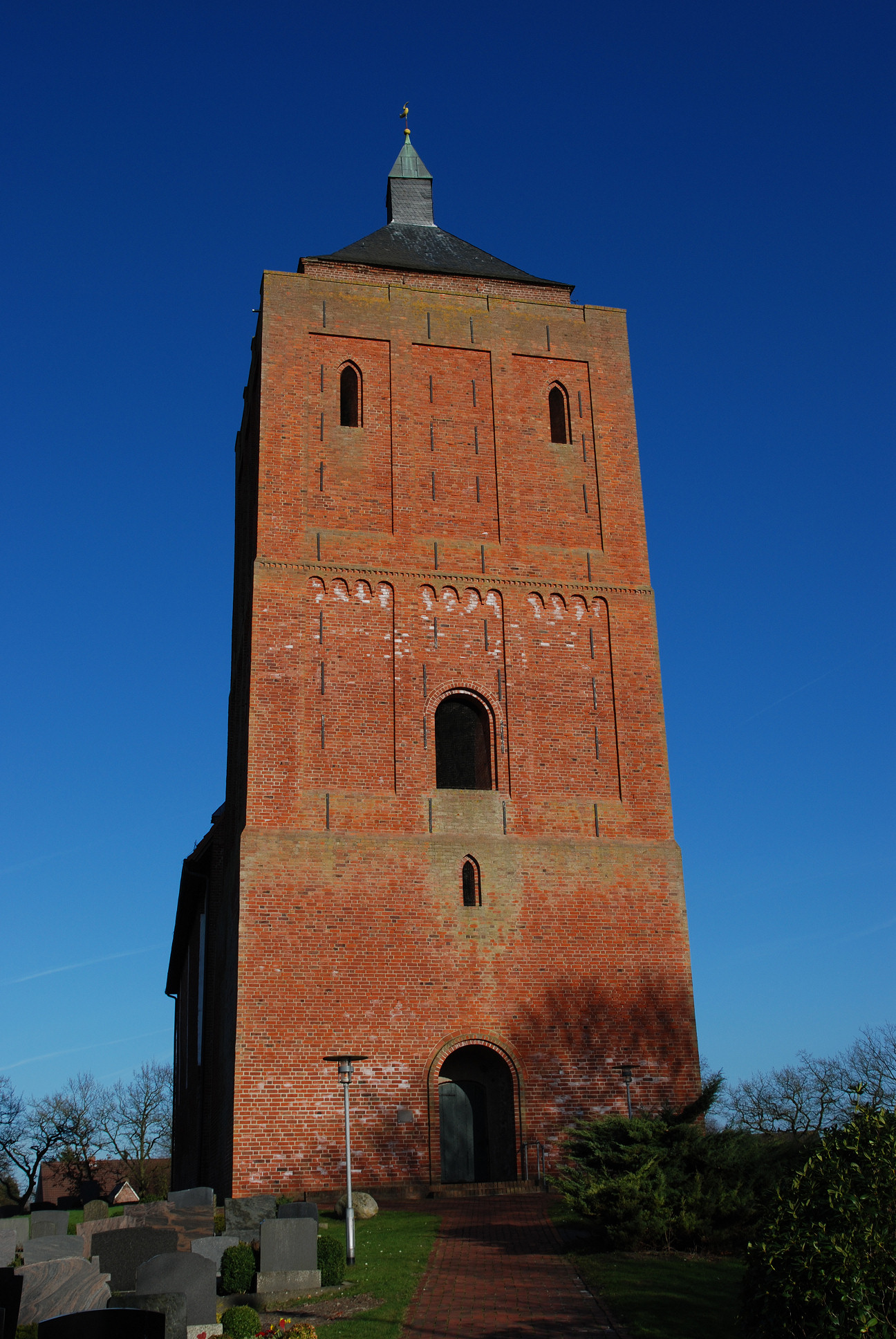 Warnfriedkirche (Frontansicht), Osteel, Niedersachsen, Deutschland, März 2007 Foto: Nicolas Höpfner (Inlandsvägen)